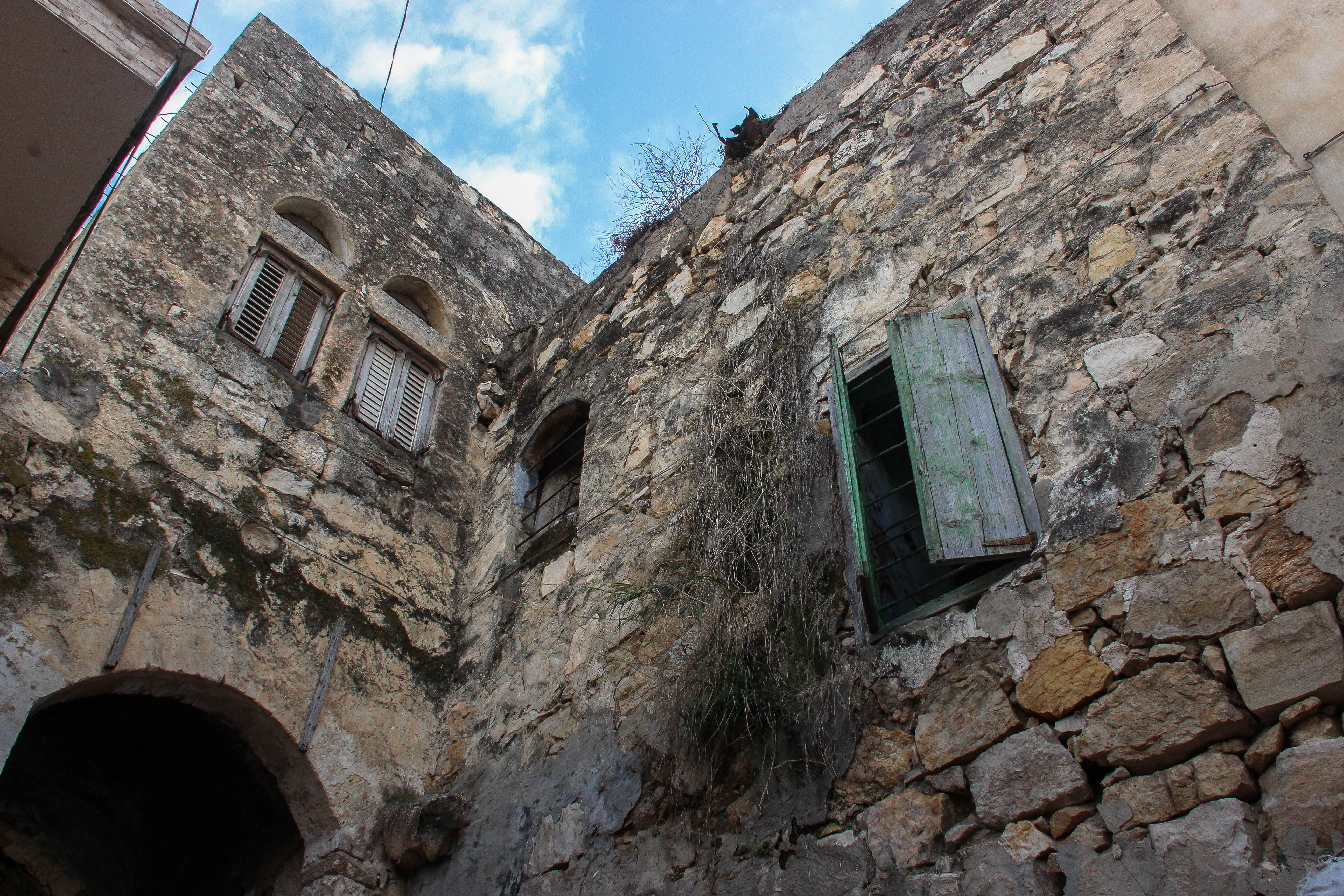 بيت قديم، أم الفحم